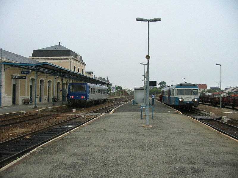 Croisement d'autorails X2800 et X2200 en gare de Guéret